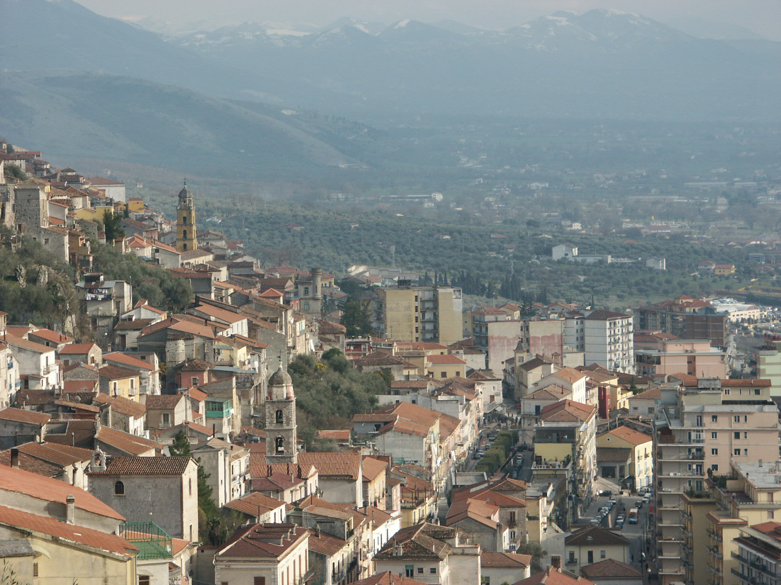 Sala Consilina, Salerno, Italy - I due campanili